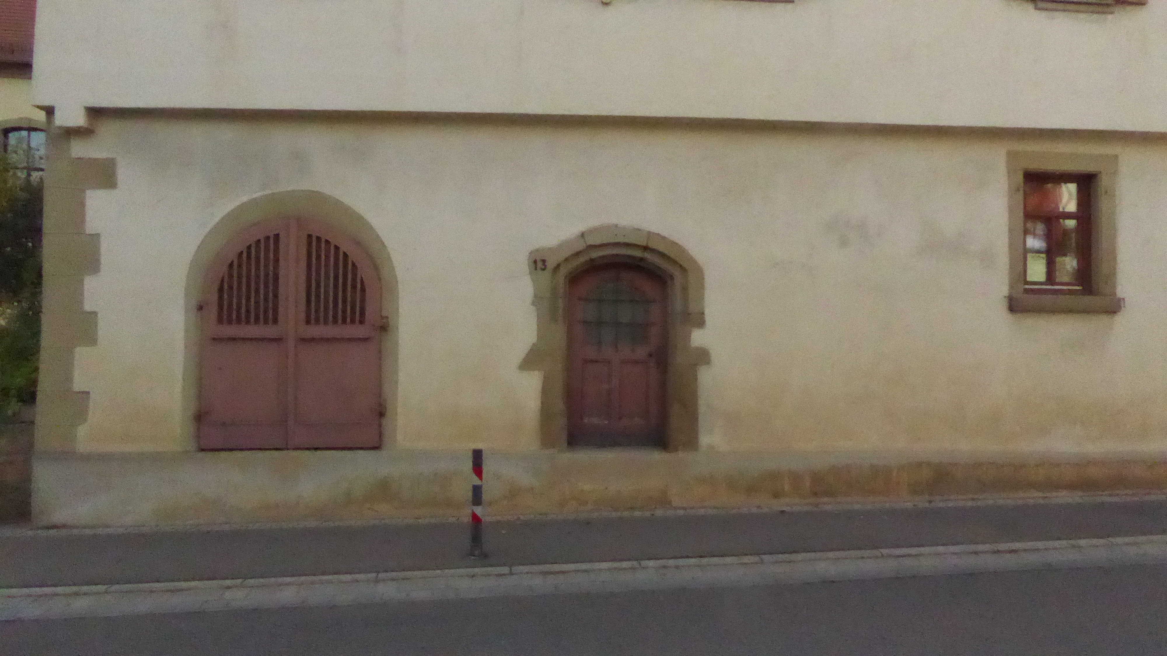 Das ehemalige Pfarrhaus in Hirschlanden (Ortsteil von Ditzingen) ist ein geschütztes Kulturdenkmal gemäß § 2 DSchG BW. Der traufständige, verputzte Fachwerkbau mit einem straßenseitigen Rundbogen-Kellertor ist mit den Jahreszahlen 1483 und 1823 bezeichnet und wurde 1992 grundlegend saniert. Im Zuge des Ausbaus der Heimerdinger Straße wurde Anfang der 1960er Jahre der bisherige straßenseitige Zugang aufgegeben und an die Rückseite des Hauses verlegt.